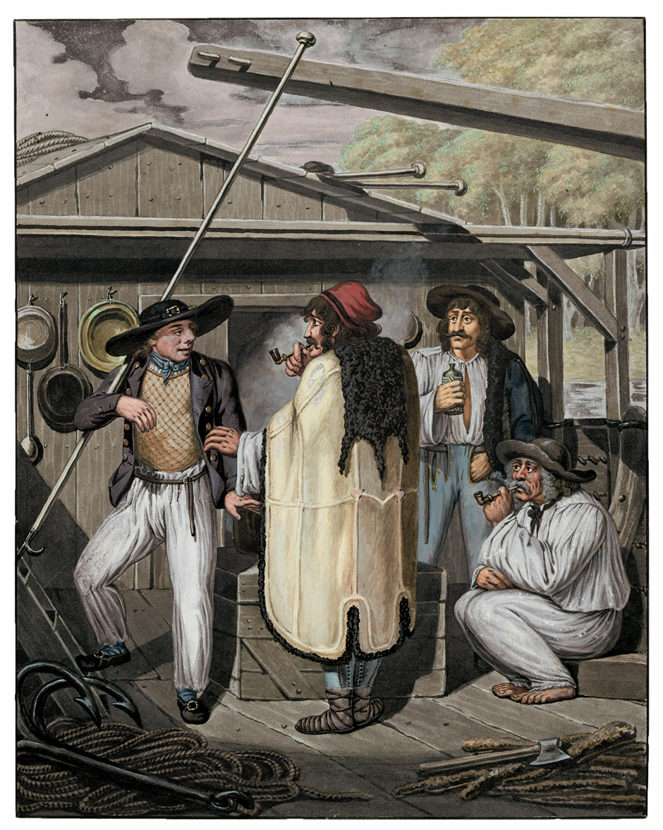 Matrosen und Fährkutscher auf einem Donauschiff. Aquarell auf Velin. 29,5 x 23,4 cm. (Benedikt Piringer fertigte nach der Vorlage von Opitz einen Kupferstich für seinen zwischen 1804 und 1812 entstandenen Zyklus "Kaufrufe" an)